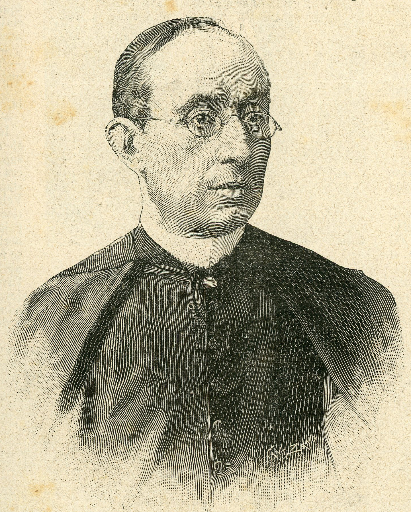 Monsignor Isidoro Carini, prefetto della biblioteca Vaticana morto a Roma il 25 gennaio (xilografia).